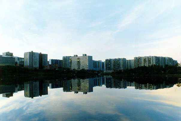 Военный городок в 69 километрах от Мурманска